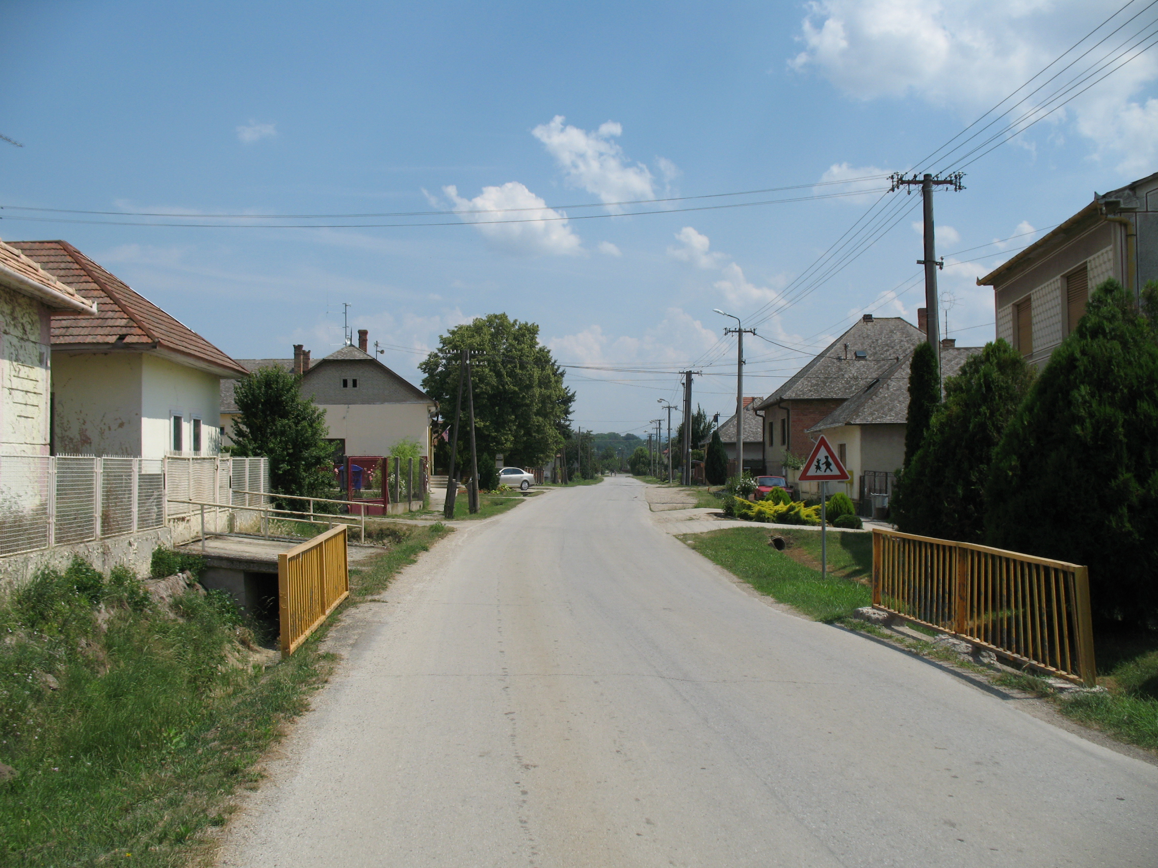 Kicsind